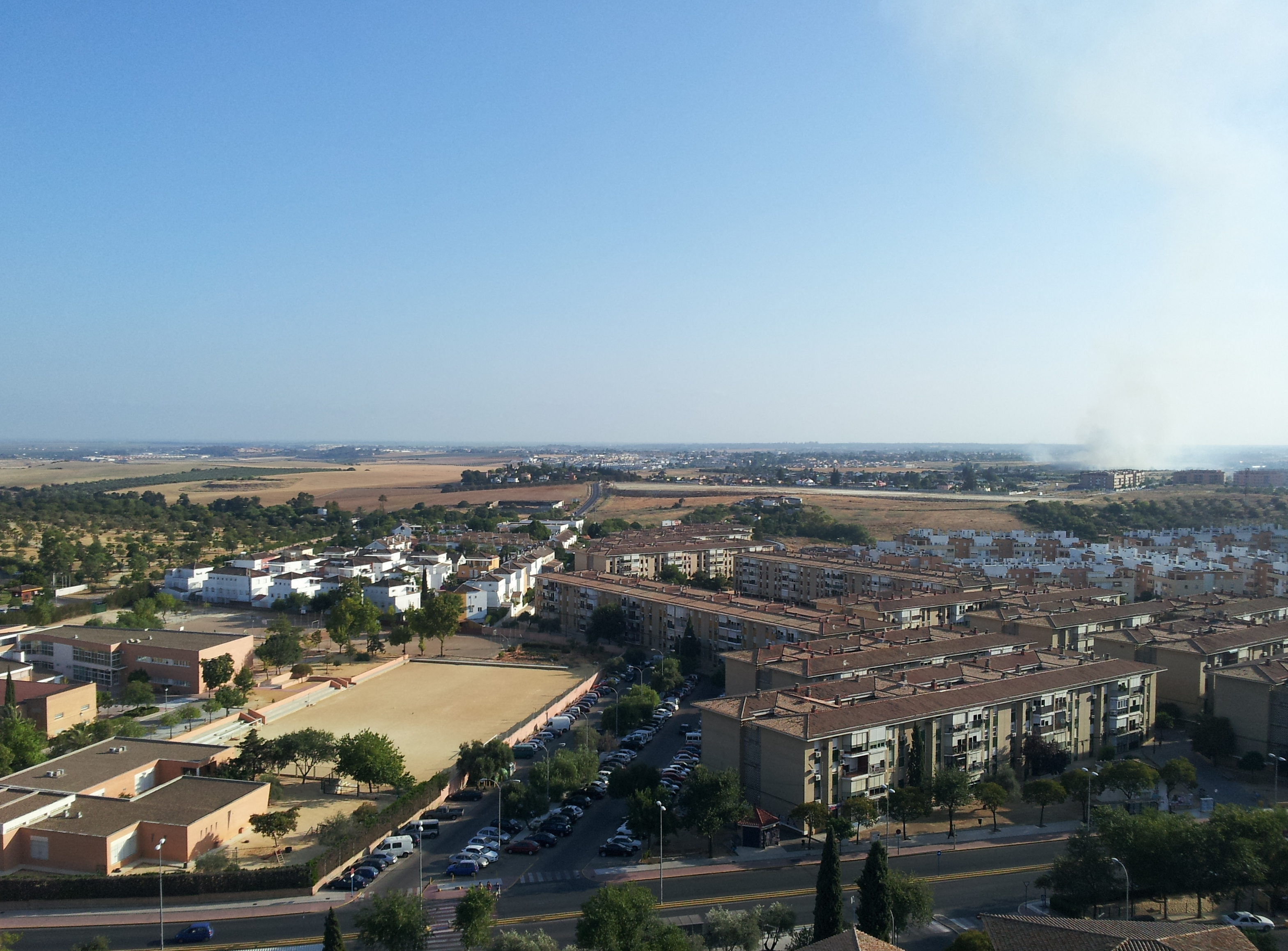 Urbanización Los Alcores y colegio el Valle Mairena del Aljarafe, fotografiadas desde la planta 15 del conjunto 16 de Ciudad Aljarafe